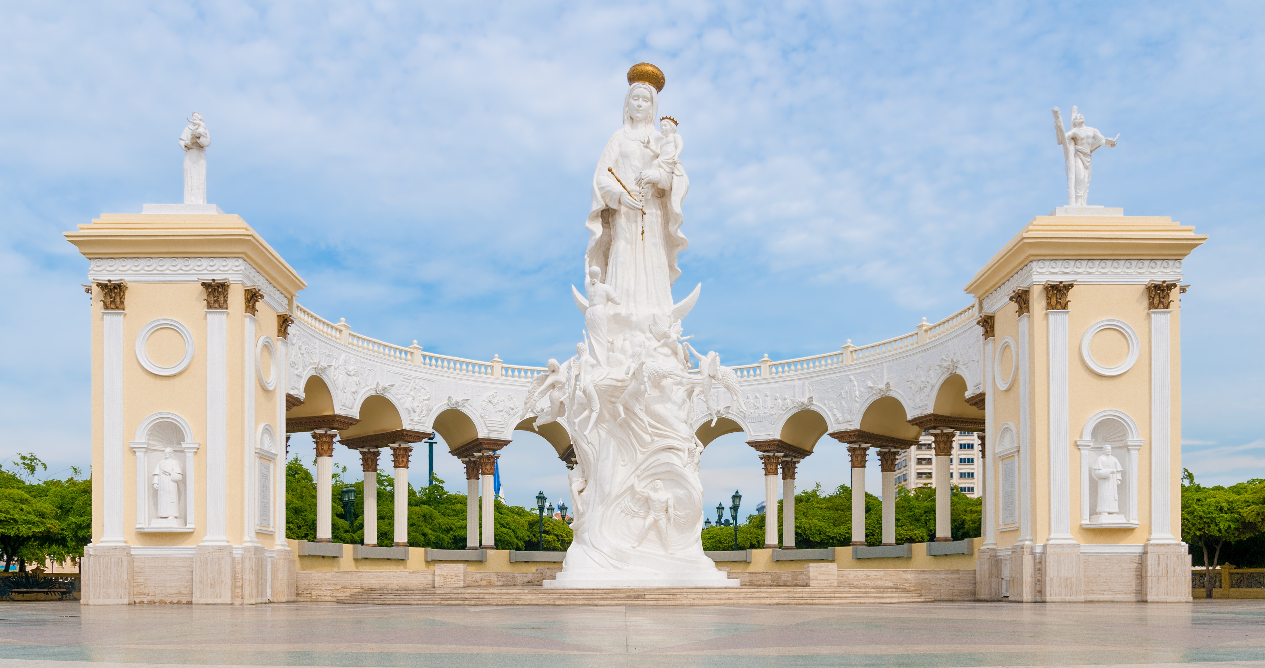 Detalle de la Basílica Nuestra Señora del Rosario de Chiquinquirá, em Maracaibo, Venezuela